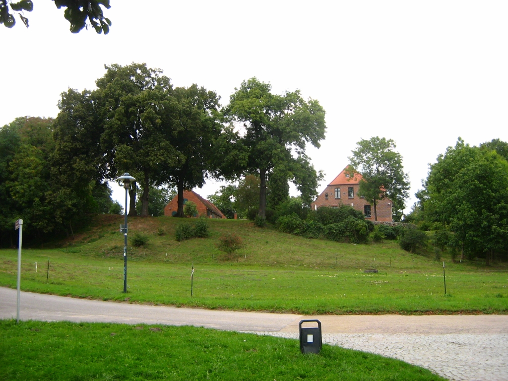 Das Kloster Broda war ein Stift des Prämonstratenserordens. Es wurde 1170 gestiftet, verarmte jedoch ziemlich schnell und wurde 1551 säkularisiert. Broda ist ein ehemaliges Dorf, welches heute zur Stadt Neubrandenburg in Mecklenburg gehört. Das Foto zeigt den Blick vom Ufer des Tollensesees auf den Hügel der ehemaligen Klosteranlage mit den später errichteten Gutsgebäuden.